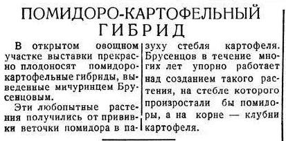 Статья "Помидорно-картофельный гибрид"